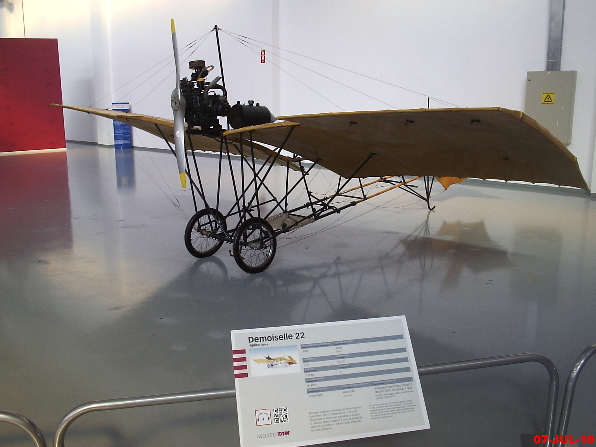 Demoiselle(Senhorita em Francês), Voou em 1907, sendo desenvolvido até 1909. Foram os menores aviões de sua época. Santos Dumont queria popularizar essas aeronaves para que fossem fabricadas em larga escala e não registrou a patente. 40 Demoiselles foram fabricados - Museu TAM